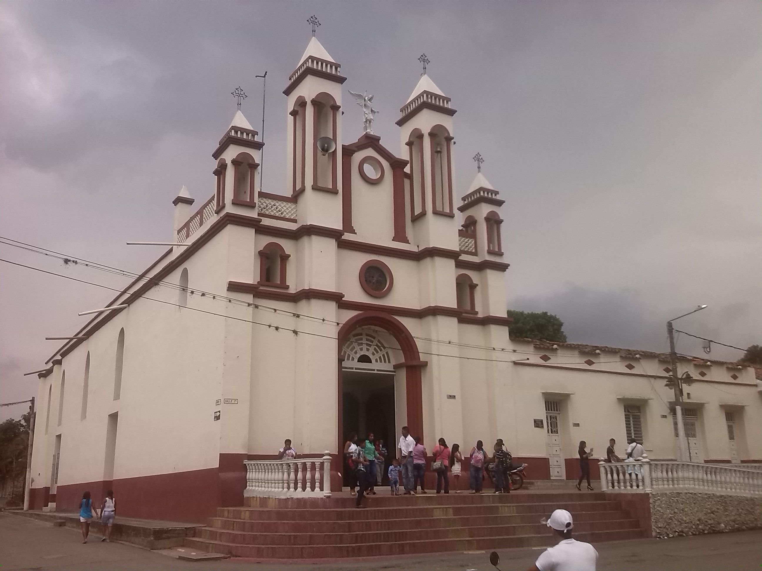 Iglesia de Corinto Cauca